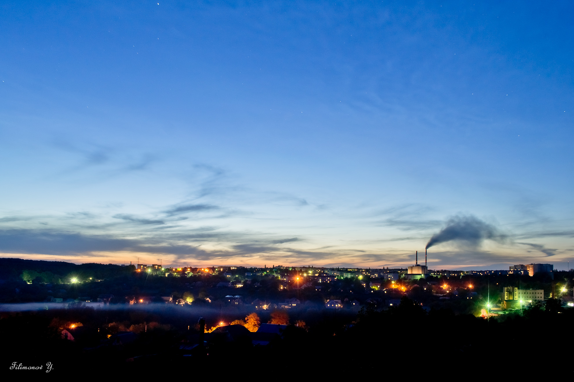 Панорама вечірнього міста Ладижин.